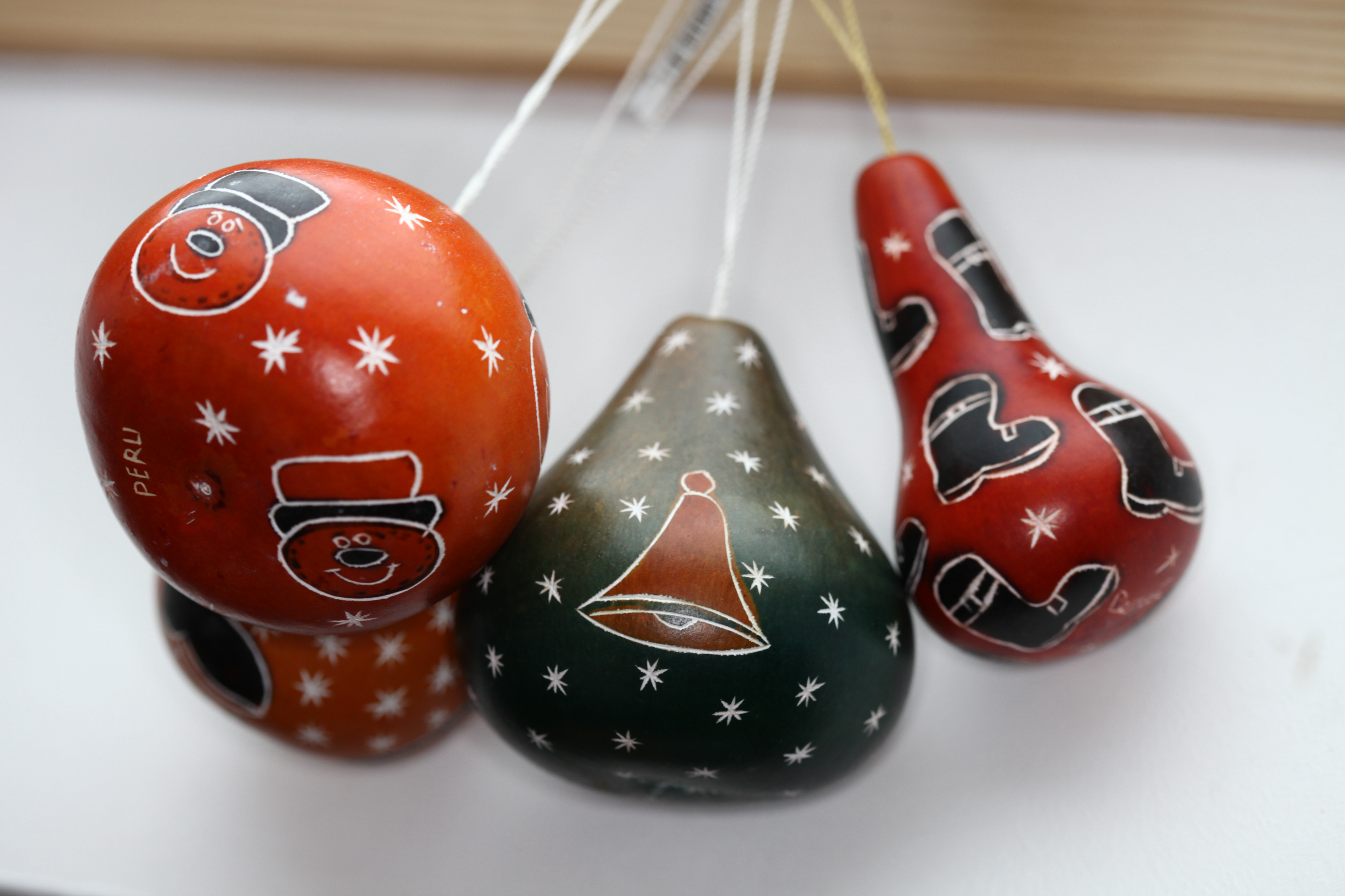 Mate burilado, de Peru